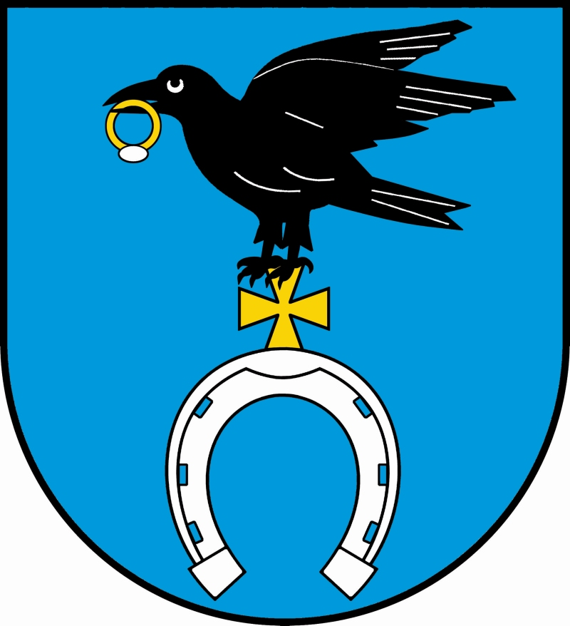 Herb gminy Krasne w powiecie przasnyskim